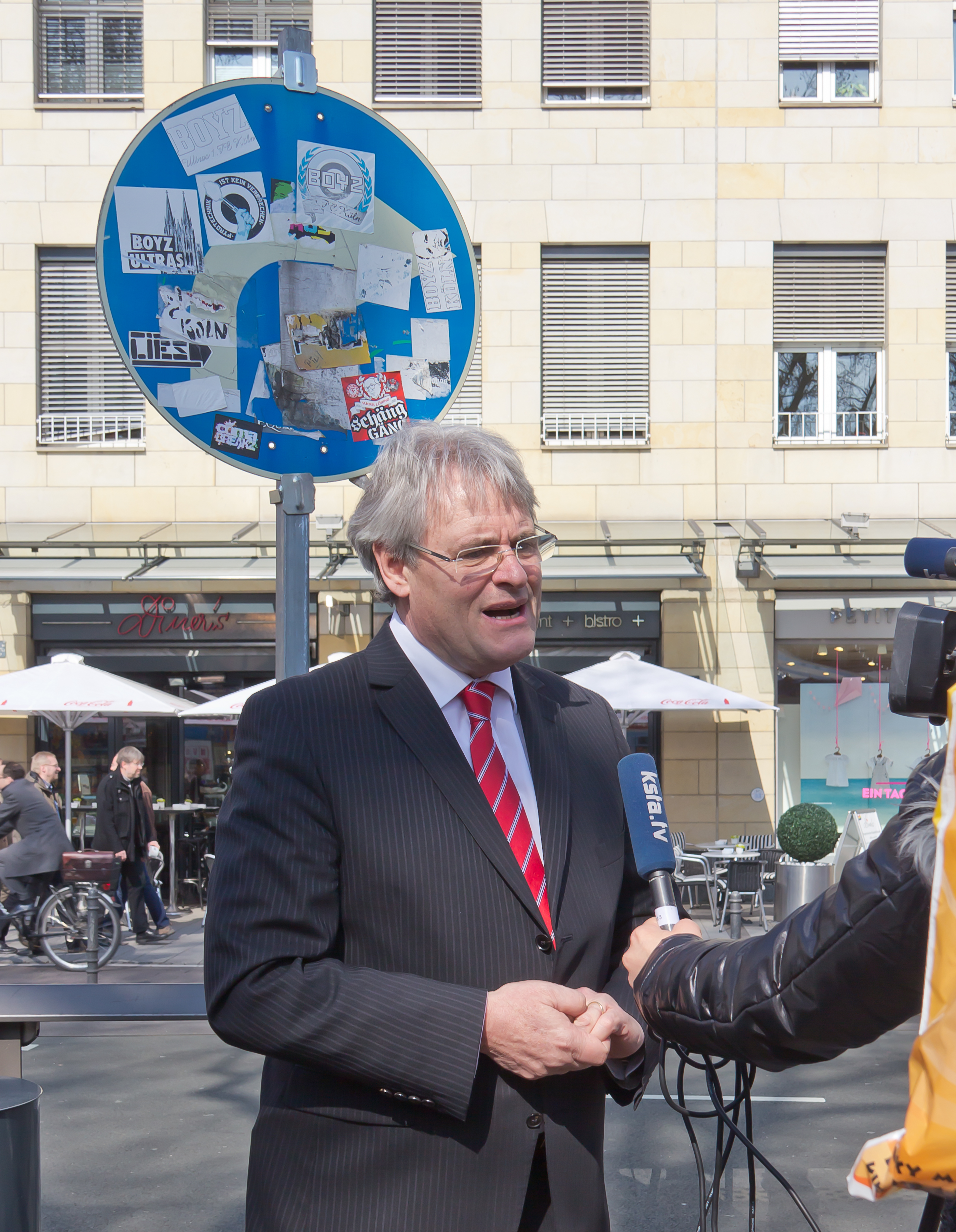 Die Stadt Köln, RheinEnergie, Kölner Verkehrs-Betriebe (KVB), Abfallwirtschafts-Betriebe (AWB) und der 1. FC Köln haben am 20. März 2012 die Initiative „Klebt Euch nicht zu!“ gegen „wildes Bekleben“ gestartet. Auf 230 City-Postern und auf den Infoscreens in den U-Bahn-Haltestellen soll auf das Problem des „wilden Klebens“ aufmerksam gemacht werden. Eine Stadtbahn der Kölner Verkehrs-Betriebe wird außerdem zur Unterstützung der Kampagne mit den Plakatmotiven gestaltet. Foto: Köln Stadtdirektor Guido Kahlen vor Verkehrsschildern, die stark mit Aufklebern zugeklebt sind und sein Versuch, die Aufkleber zu entfernen. Interview mit ksta.tv